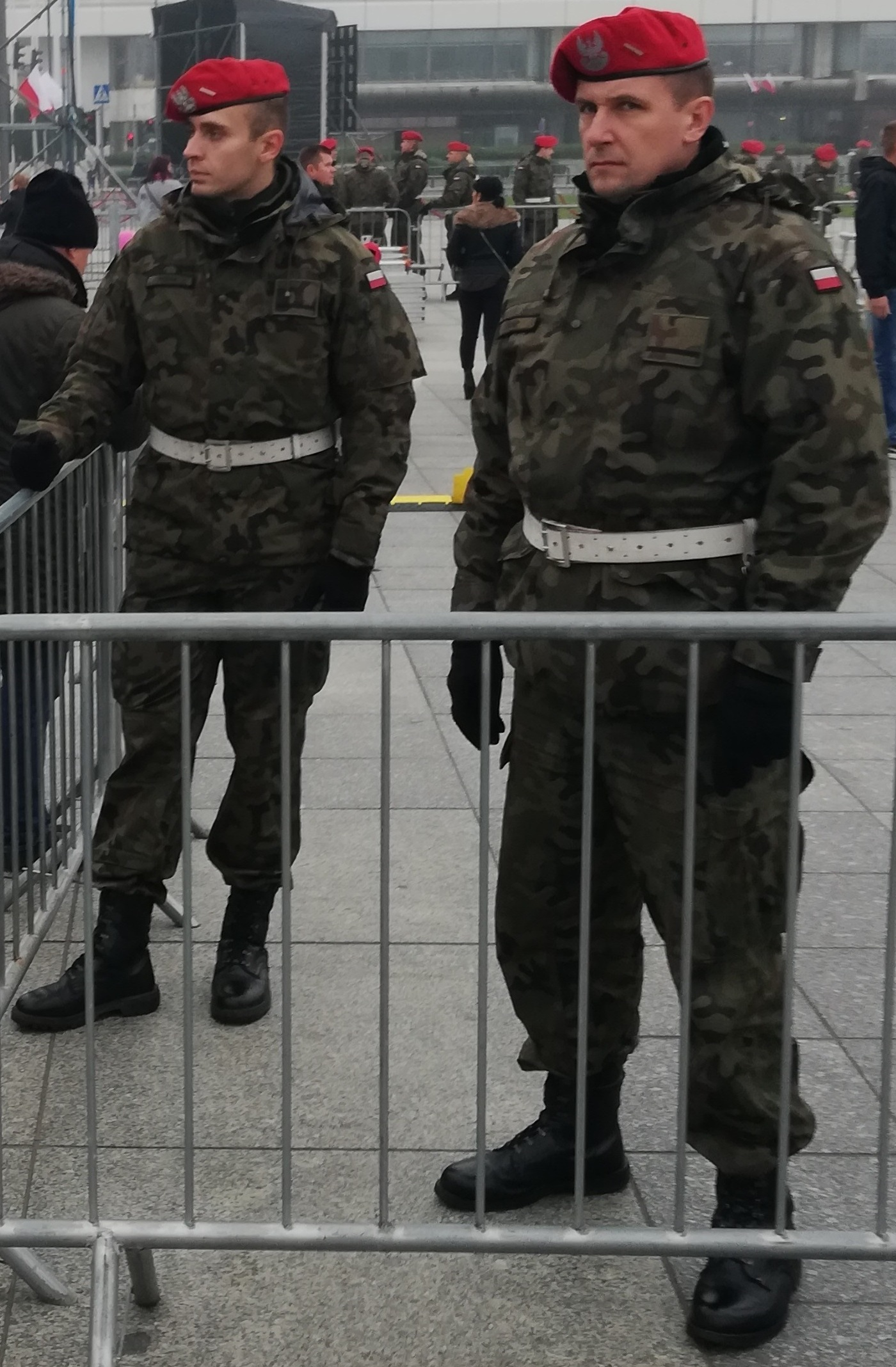 Żandarmeria strzeże porządku podczas uroczystości odsłonięcia pomnika Lecha Kaczyńskiego na Placu Piłsudskiego.